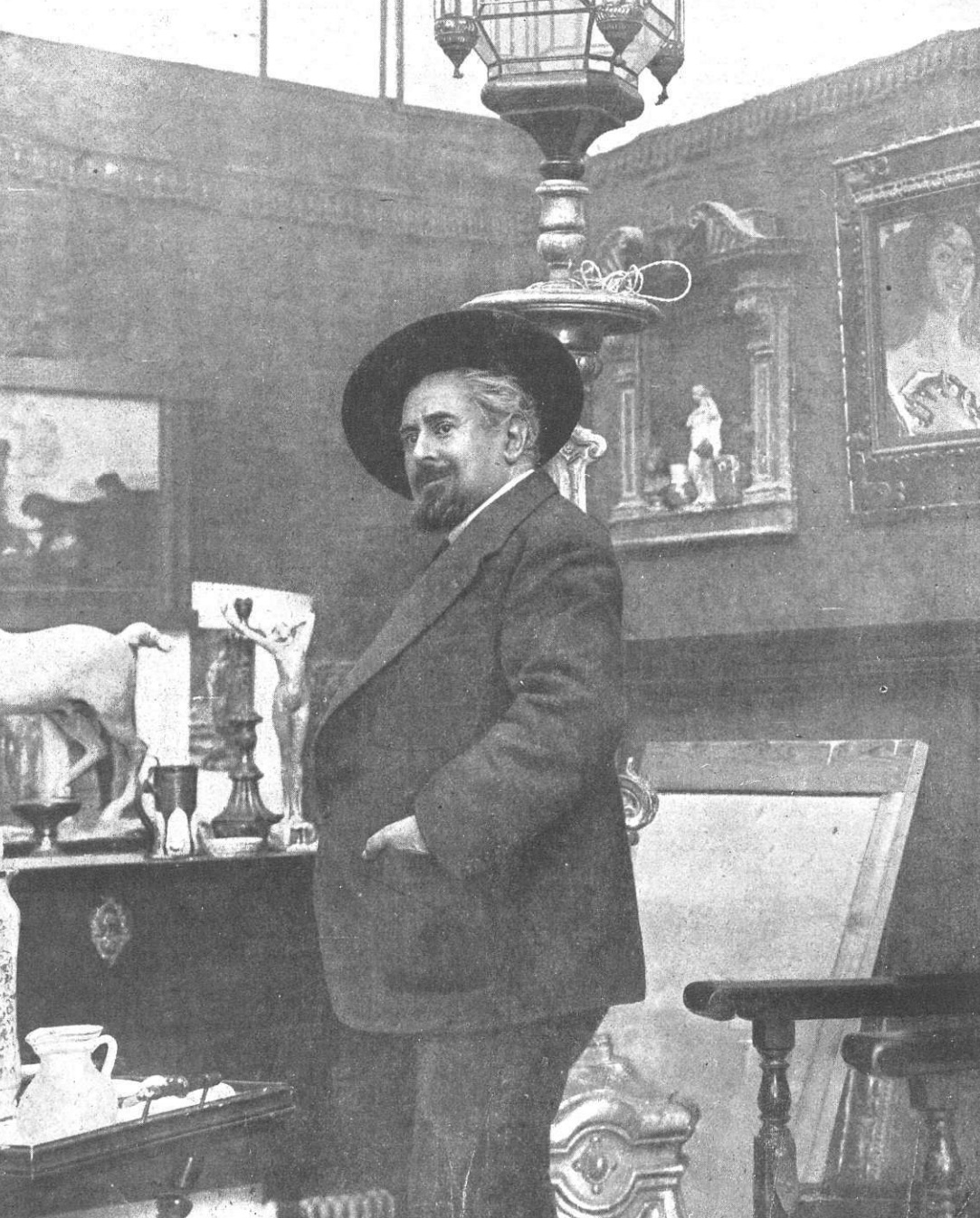 Pompeyo Gener, por Campúa.